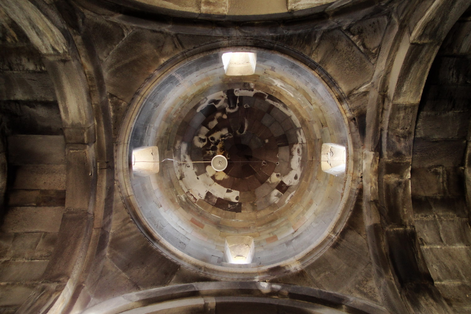 Hrazdan, Maqravanq monastery, interior